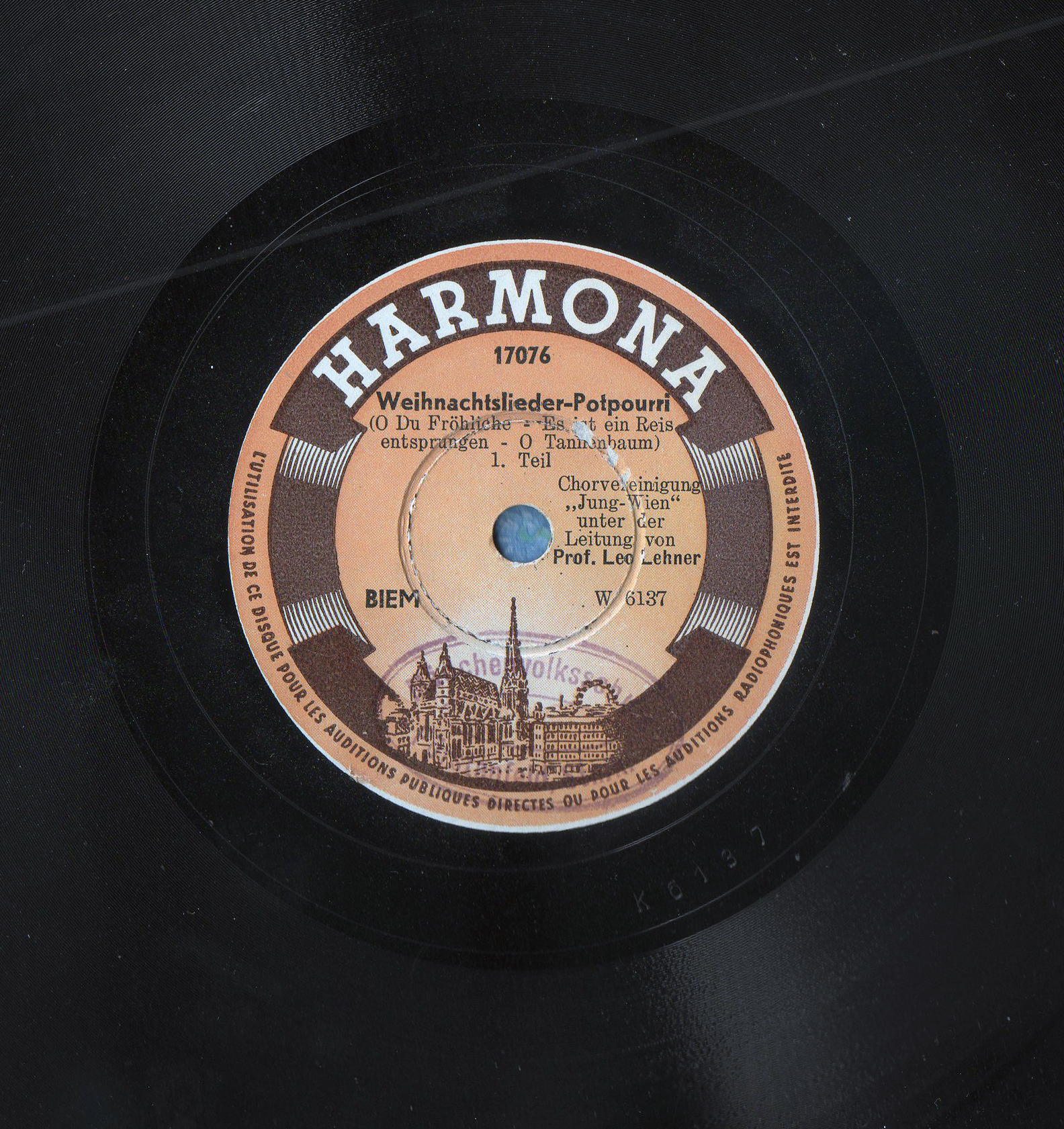 Schallplattenlabel einer Platte mit Weihnachtsliedern, gesungen von der Chorvereinigung Jung-Wien unter der Leitung von Leo Lehner ehemaliger Besitz laut Stempel: Mädchenvolksschule Fürstenfeld, Steiermark